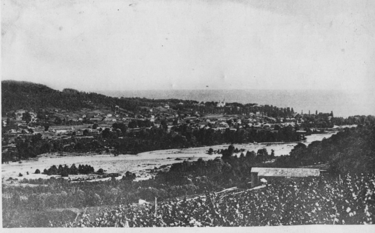 На переднем плане фотографии храм, прозванный в народе "церковь без купола" за хлудовским парком в Сочи